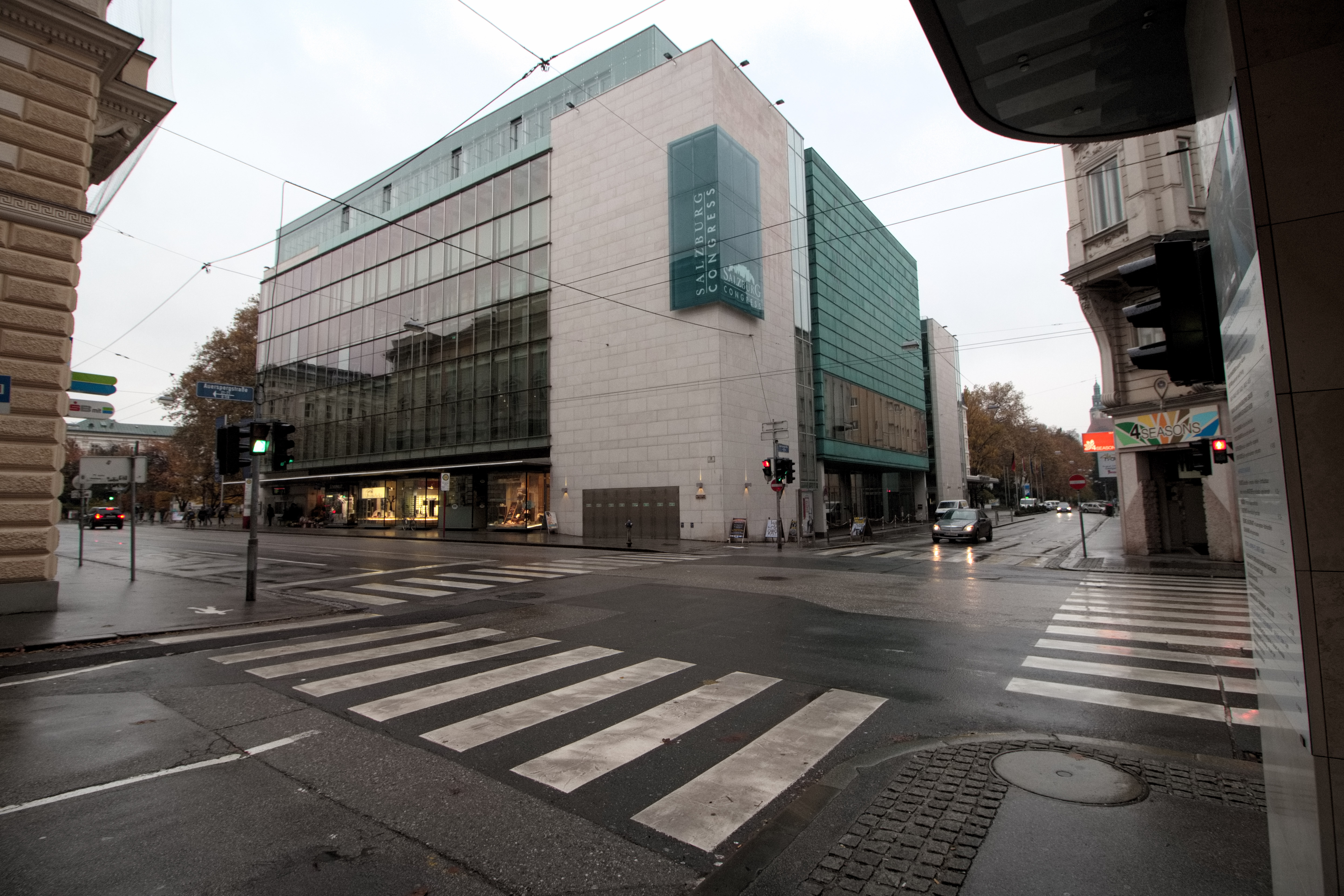 Das Salzburger Kongresshaus an der Kreuzung Rainerstraße (links-rechts) mit Auerspergstraße im Salzburger Stadtteil Neustadt.